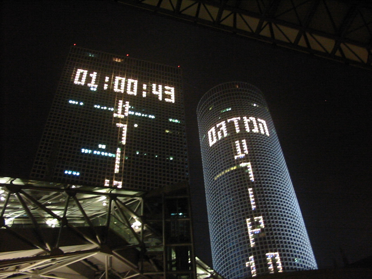 הספירה לאחור לפרסום תוצאות מדגם ערוץ 10, כפי שהופיעה על מגדלי עזריאלי בת"א בליל הבחירות לכנסת ה-16